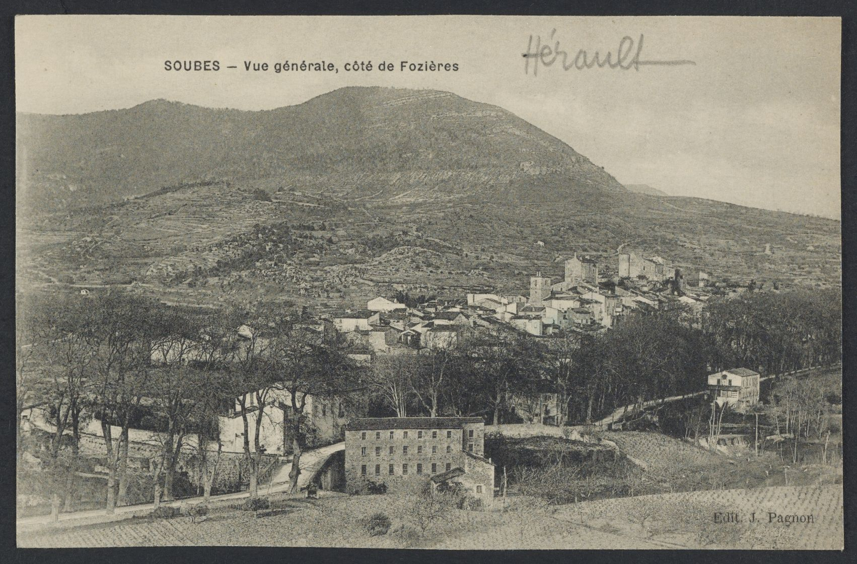 Soubès. - Vue générale, côté de Fozières : carte postale.